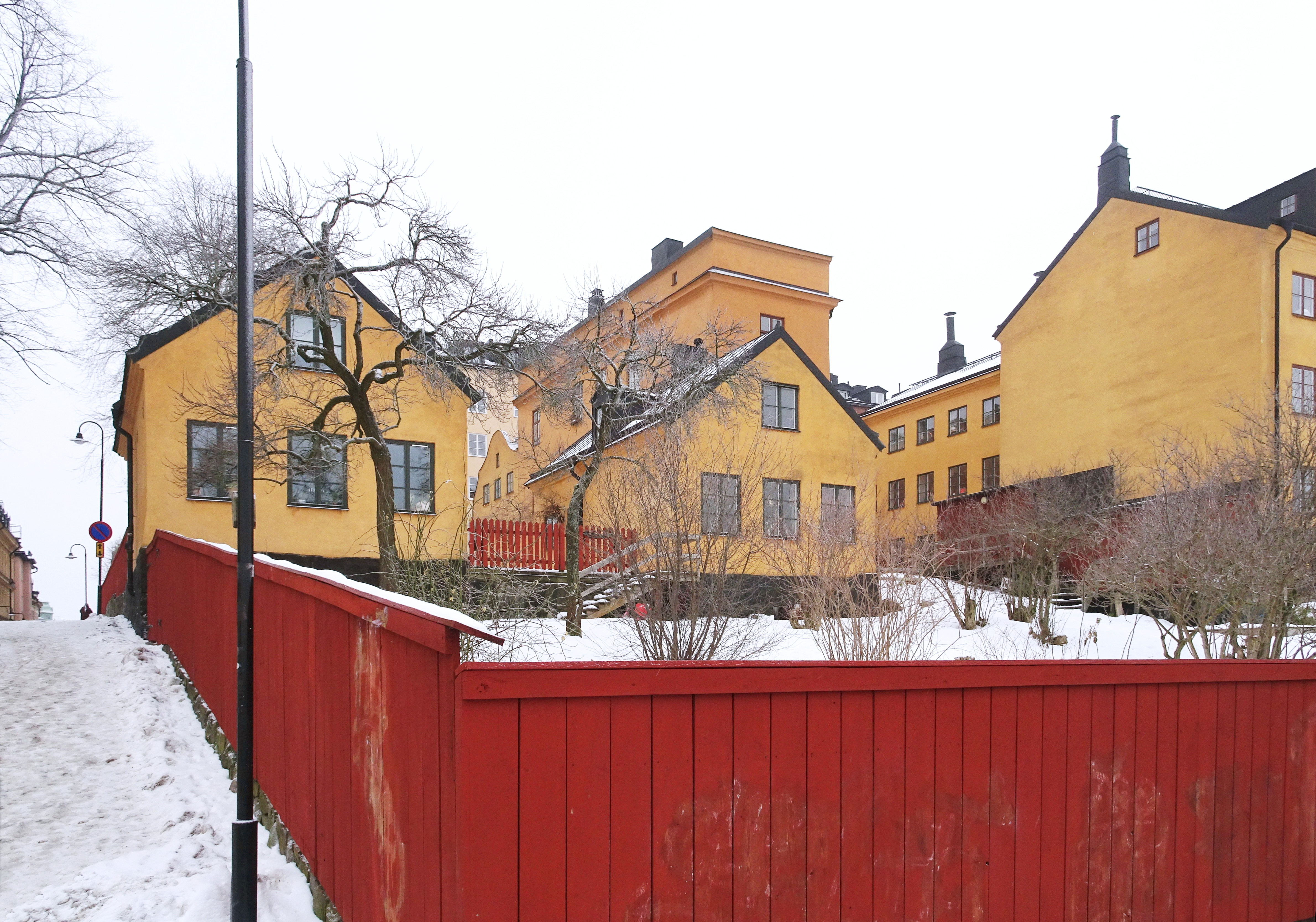 Bastugatan 22D och E "Tvillinghusen"